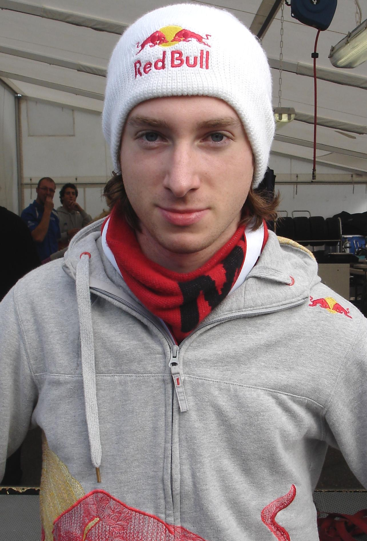 Mirko Bortolotti, Bild entstanden im Rahmen des DTM-Rennwochenendes auf dem Hockenheimring.